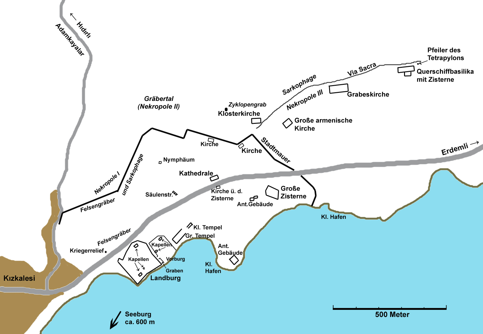 Plan der Ruinen in Korykos bei Kızkalesi, Südtürkei nach Ernst Herzfeld; Samuel Guyer: Meriamlik und Korykos. Zwei christliche Ruinenstädte des Rauhen Kilikiens, Monumenta Asiae minoris antiqua 2, Manchester 1930